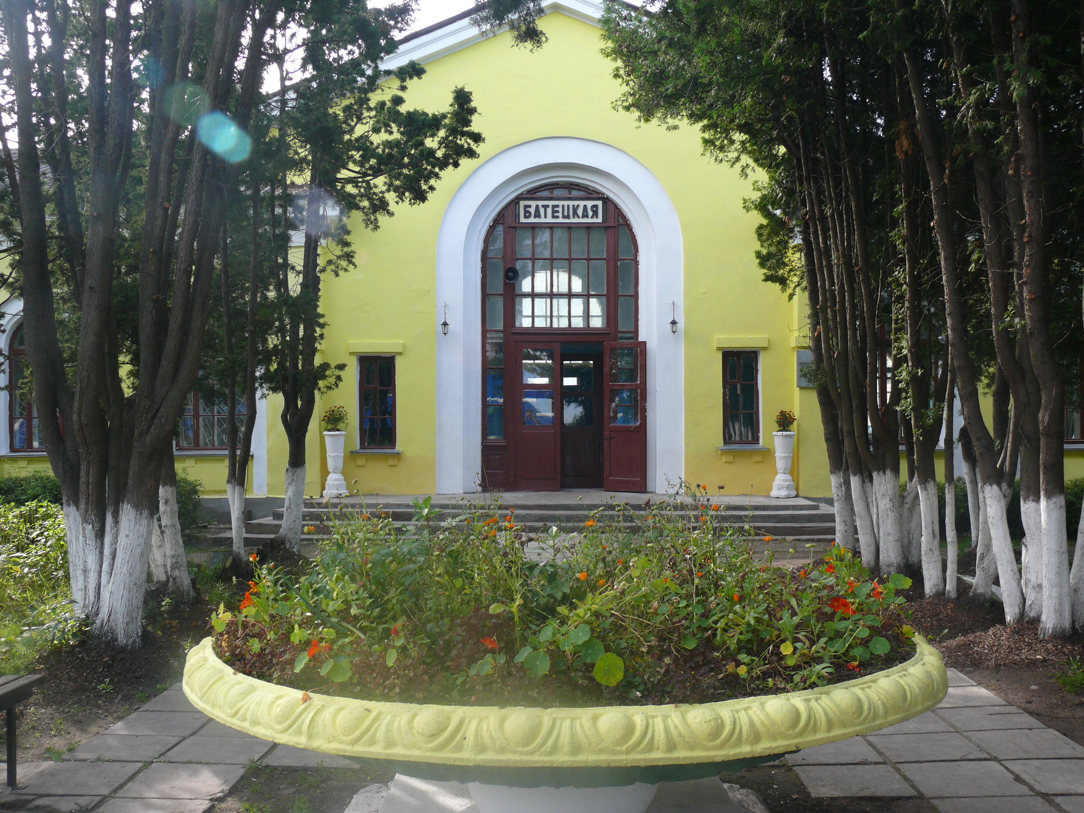 Посёлок Батецкий. Новгородская область